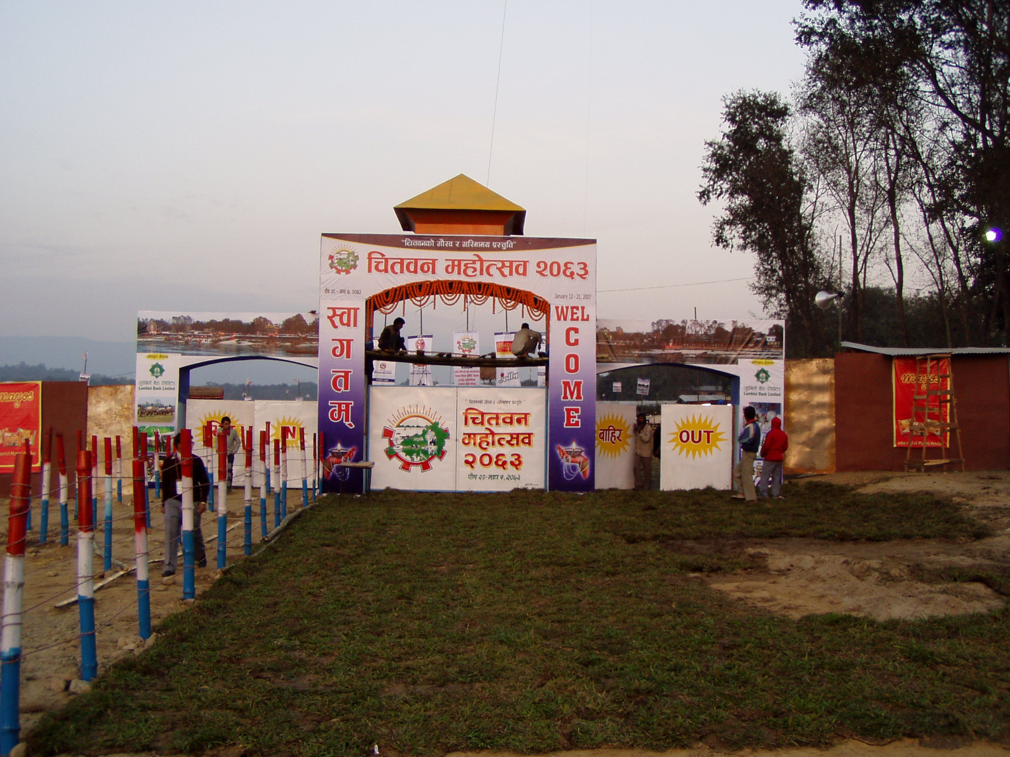 Nepali language